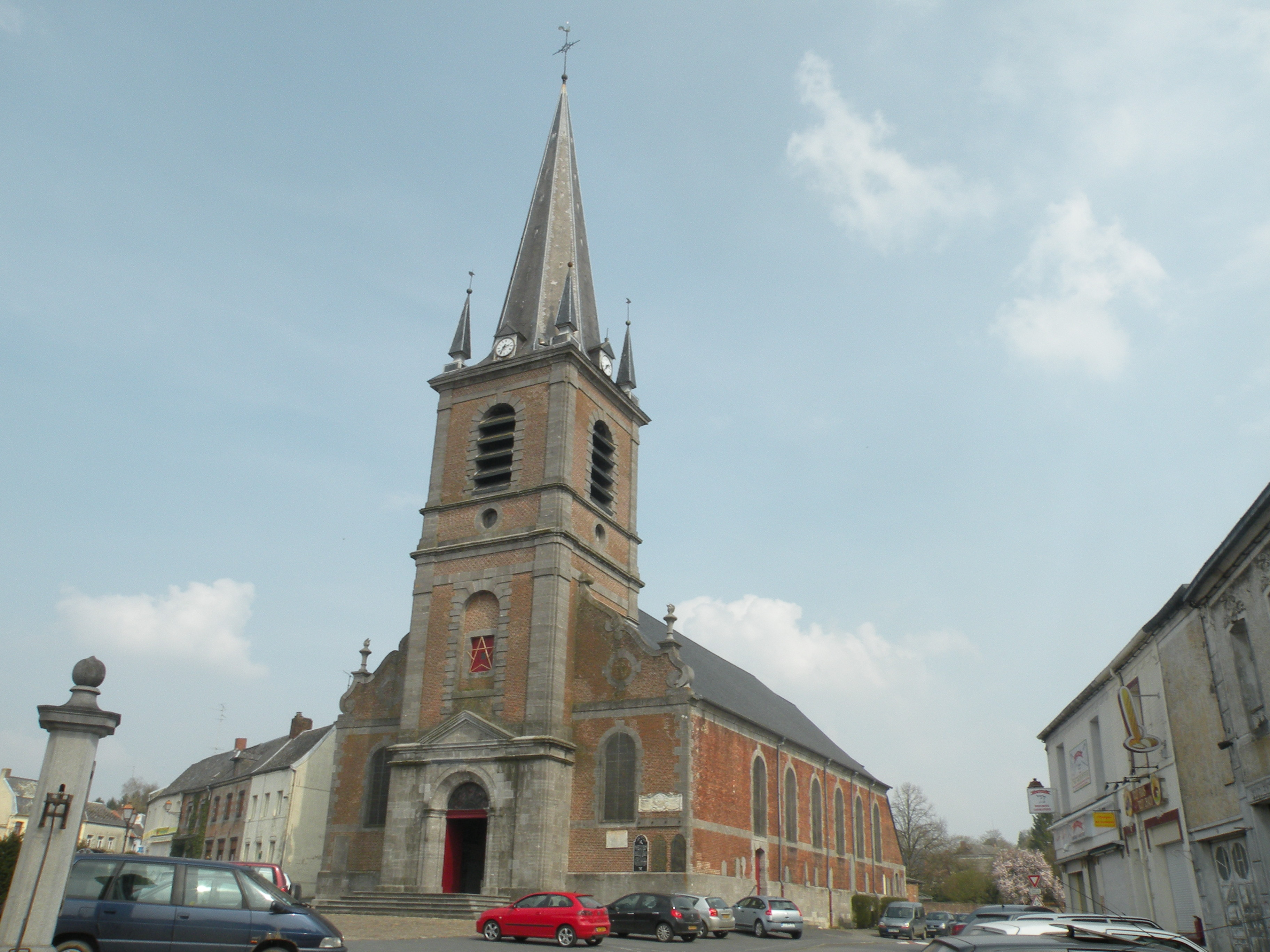 eglise de maroilles, nord, france